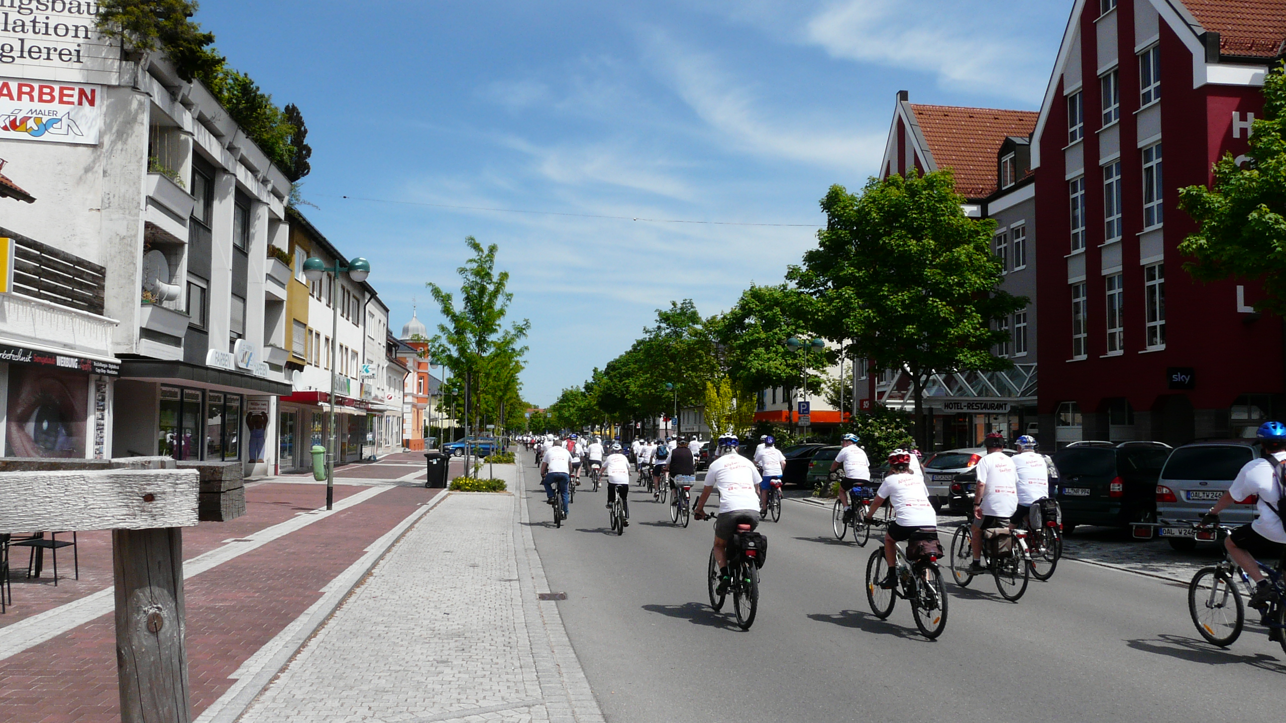 6. Allgäuer Radltour, Zieleinfahrt Bahnhofstraße in Buchloe